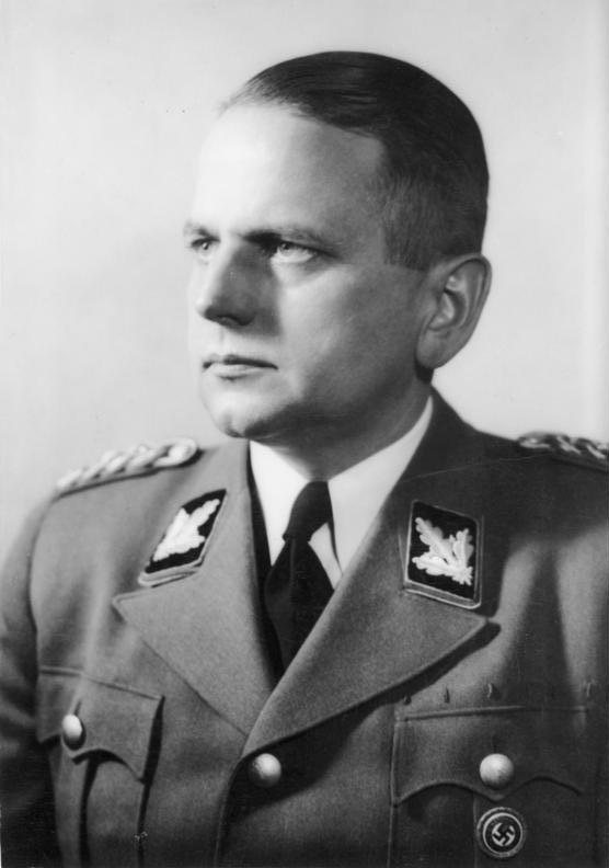 Otto Ohlendorf SS-Brigade-Führer Otto Ohlendorf wurde vom Führer auf Vorschlag des Reichswirtschaftministers Funk mit der Führung der Geschäfte des Hauptabteilungsleiters im Reichswirtschaftministerium beauftragt. Gleichzeitig hat Reichswirtschaftminister Funk Hauptabteilungsleiter Ohlendorf zum ständigen Vertreter des Staatssekretärs im Reichswirtschaftsministerium bestimmt. 19.11.43 [SS-Brigadeführer Otto Ohlendorf] Abgebildete Personen: Ohlendorf, Otto: SS-Brigadeführer, Leiter SD im Reichssicherheitshauptamt (RSHA), 1951 hingerichtet, Deutschland